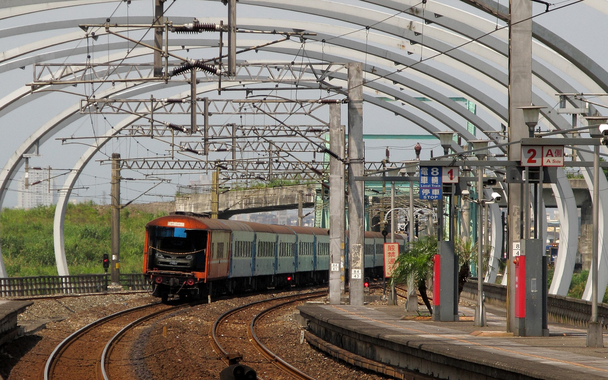 臺灣鐵路管理局RCK100型汽車載運車附掛於復興號列車末端，行經冬山車站。